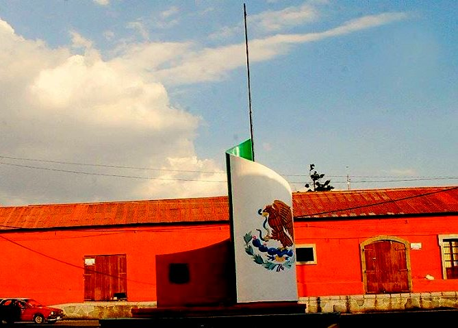 Monumento estación ferroviaria, Santa Ana Chiautempan